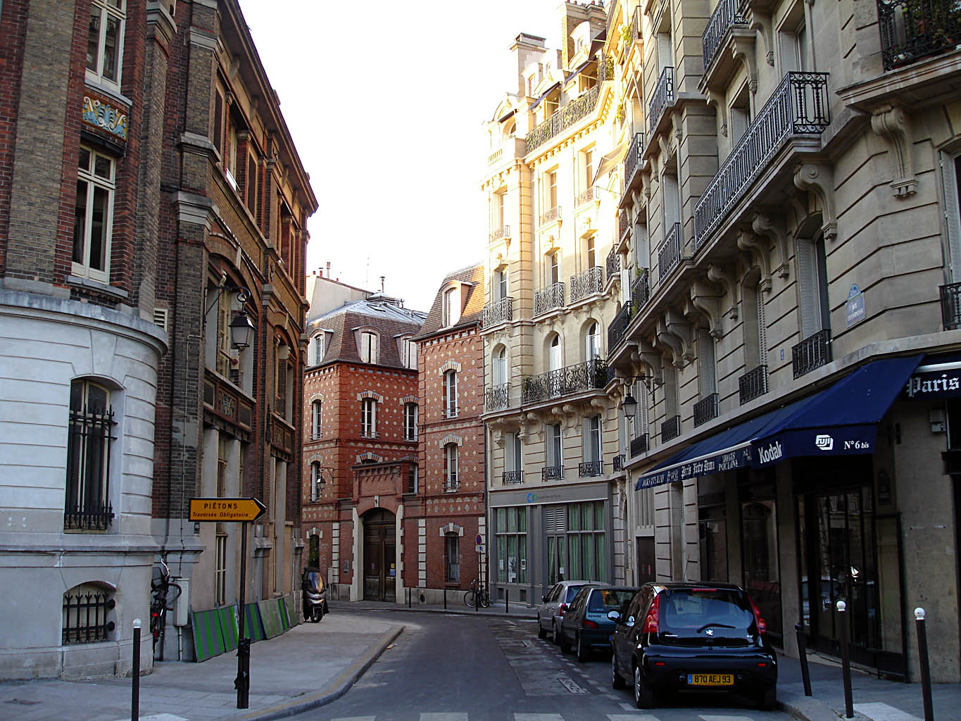 Rue Chanoinesse, Paris (France)